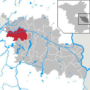 Spreenhagen in Brandenburg (Country) - District Oder-Spree